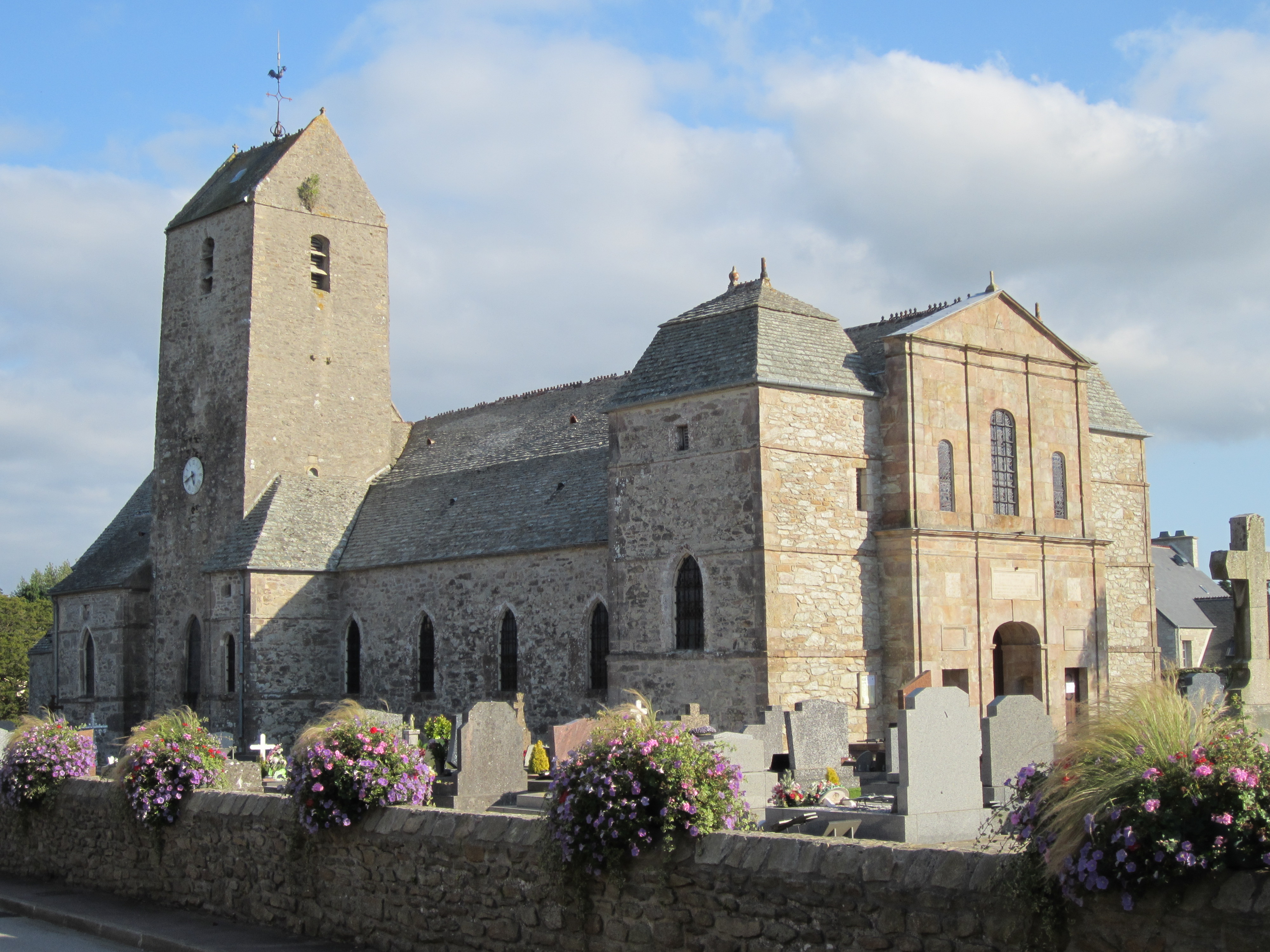 Église Notre-Dame de Digosville